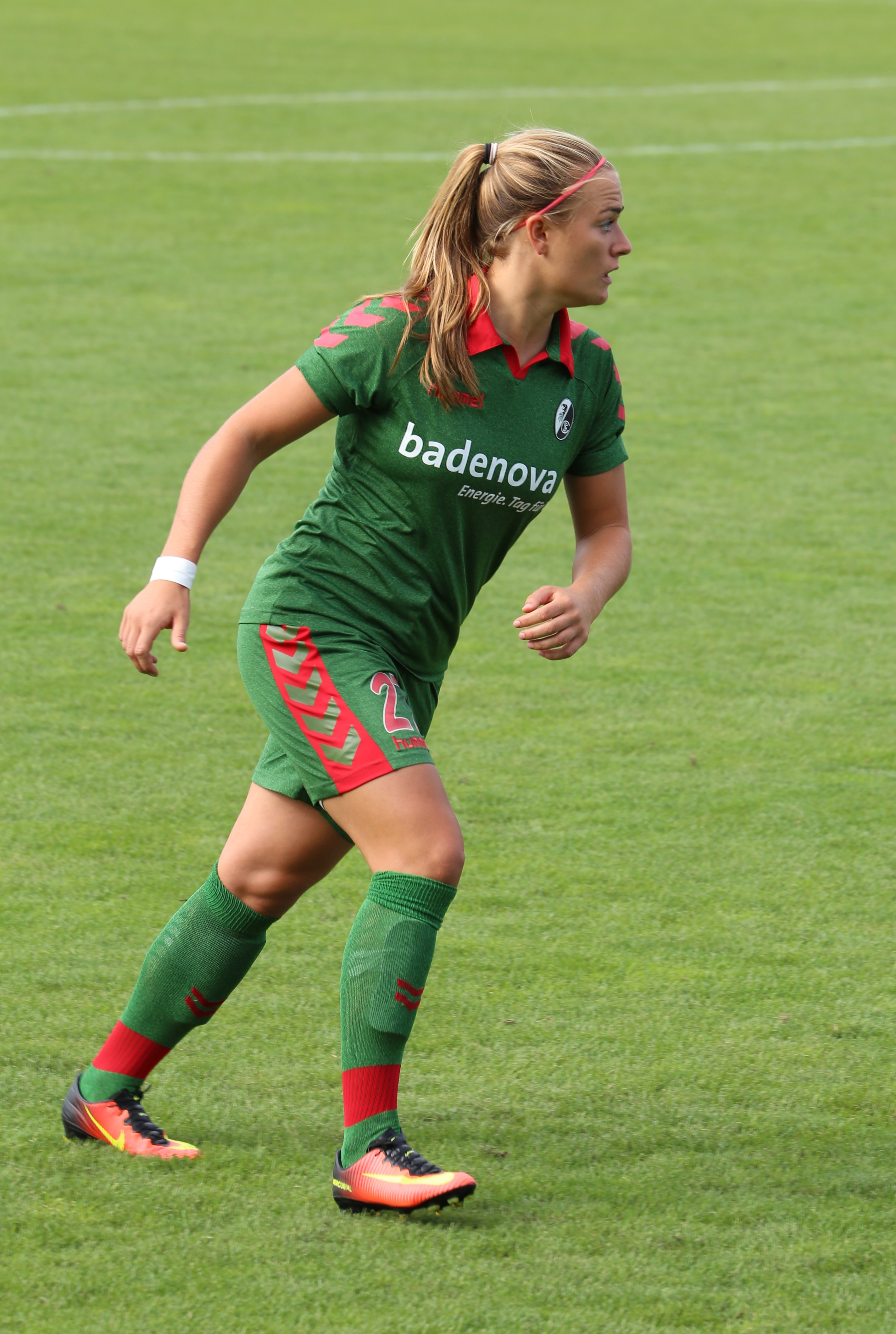 Clara Schöne, SC Freiburg, beim Frauen-Bundesliga-Spiel FC Bayern München gegen SC Freiburg am 3. September 2016 im Stadion an der Grünwalder Straße (Ergebnis war 1:1).